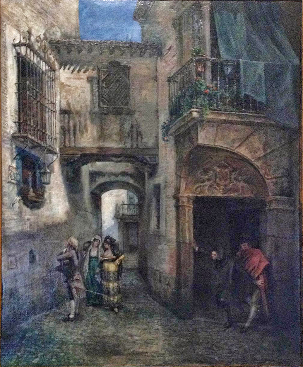 Cuadro perteneciente a una colección particular, pintado por Valentín Barrecheguren representando a unas figuras de la época junto a la casa de los condes de Castillejo en la calle Ballesteros de Granada